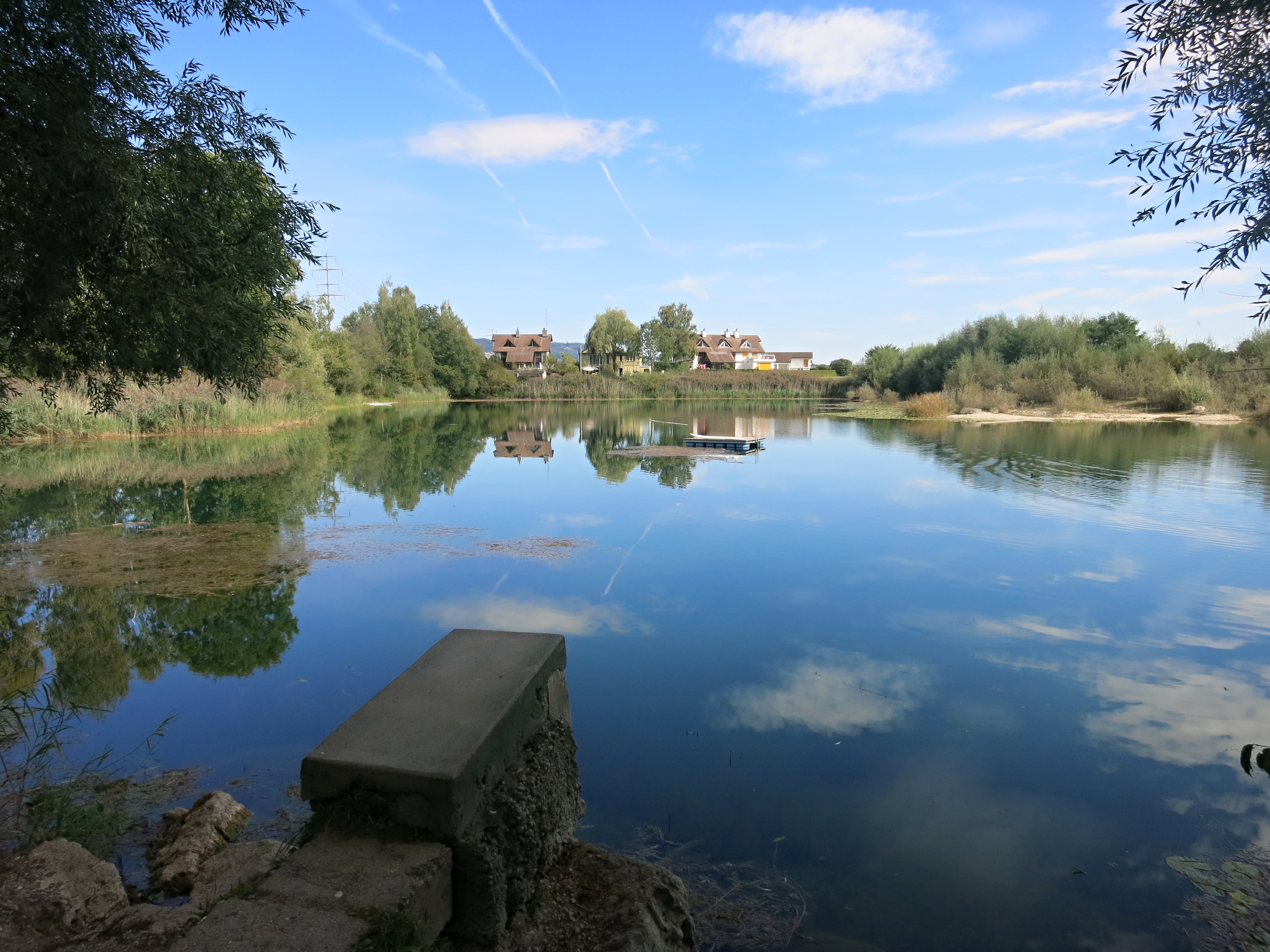 Vago Weiher